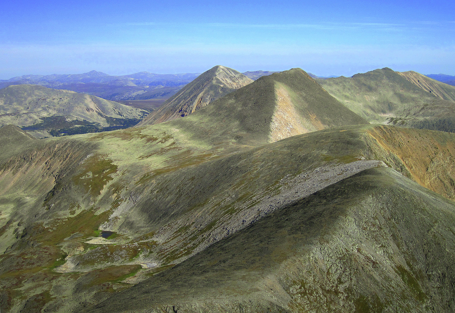 Altai mountains aerial